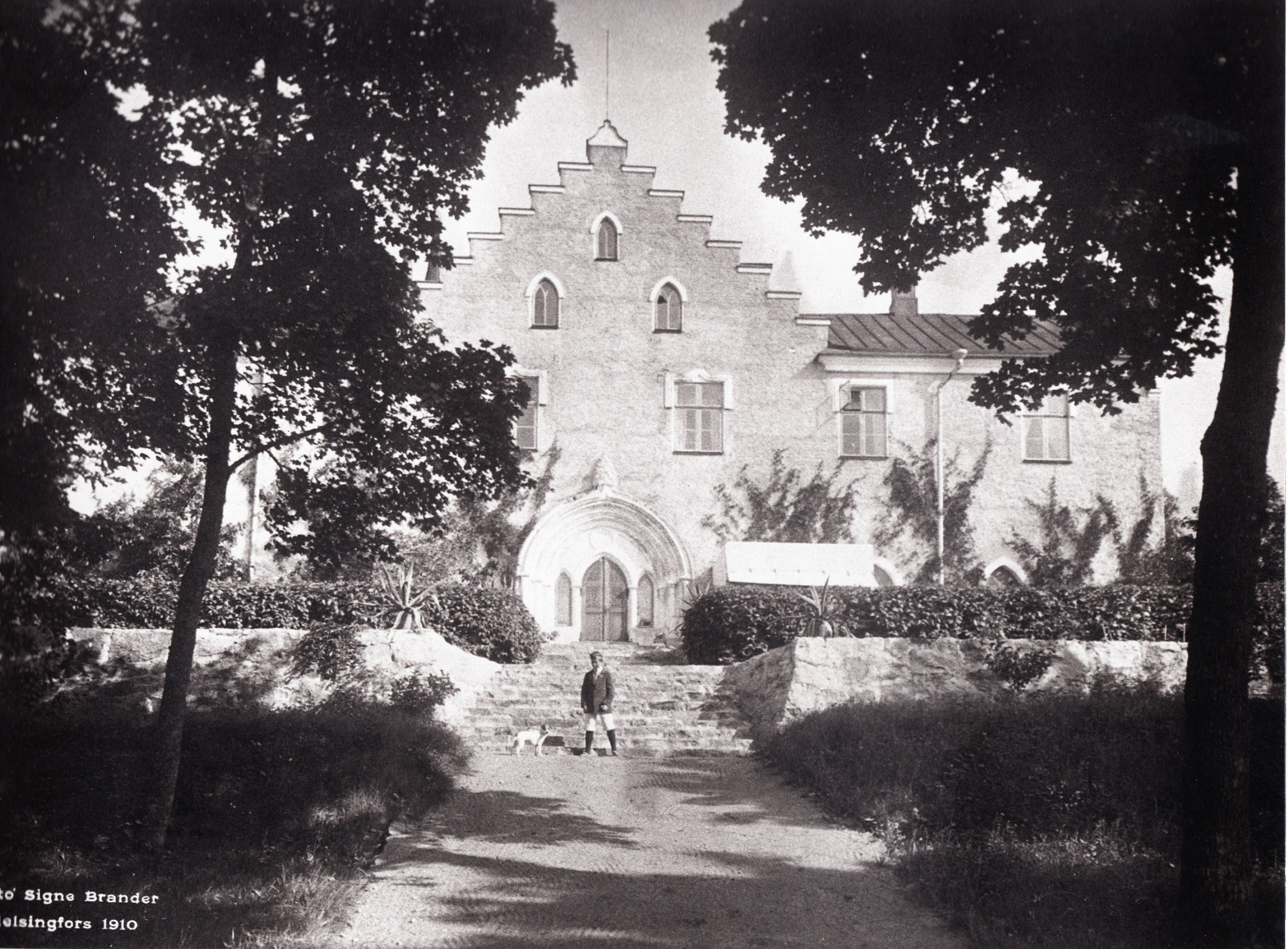 Suitian kartano vuonna 1910